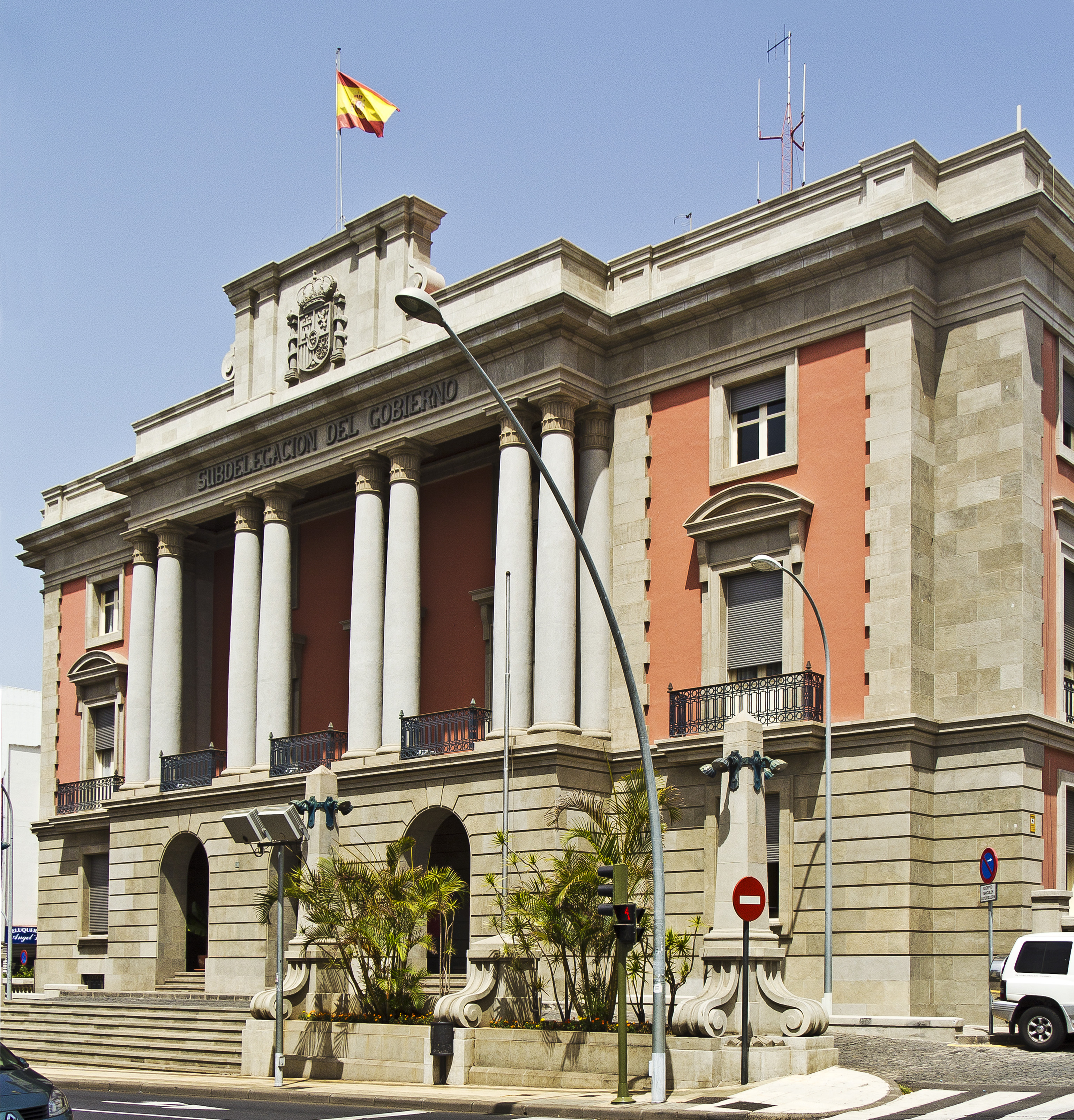 Das Gebäude der „Subdelegación del Gobierno“ (ehemals „Gobierno civil“) in Santa Cruz de Tenerife steht gegenüber dem Rathaus im denkmalgeschützten Stadtteil „Barrio de los Hoteles“. Es wurde 1951 fertiggestellt. Der Architekt war Domingo Pisaca Burgada.